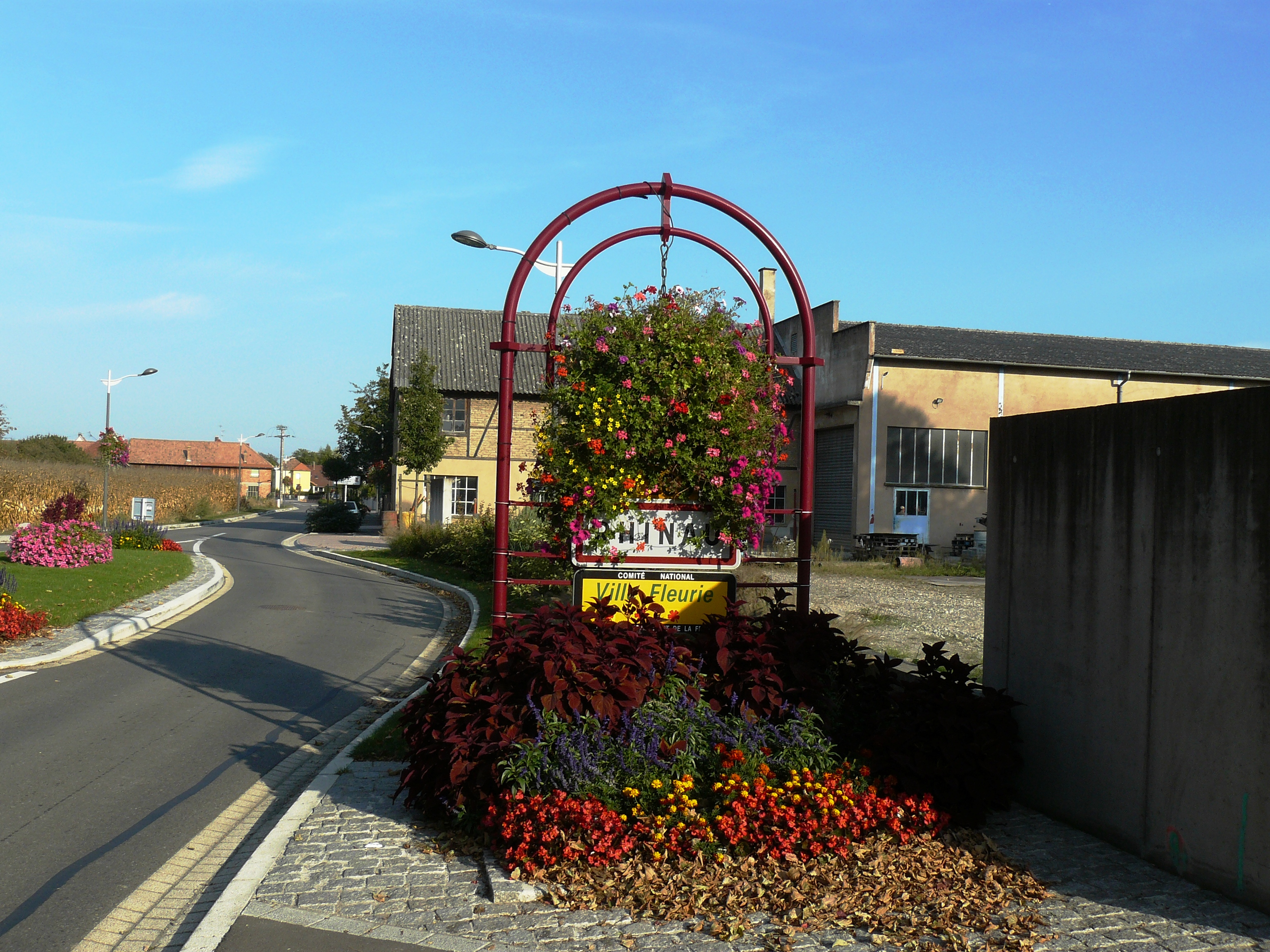 Entrée du village de Rhinau